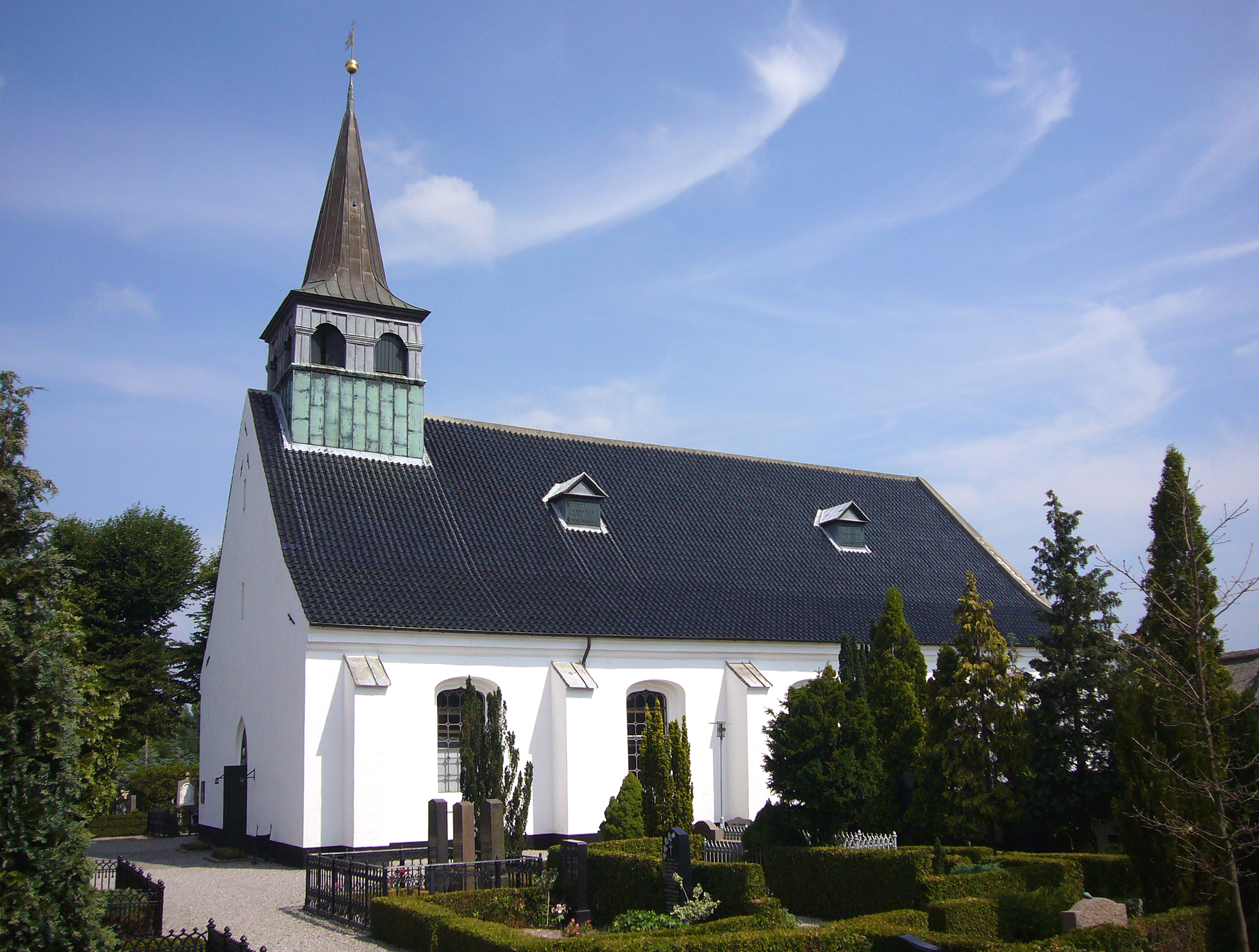 Store Magleby Kirke, Copenhagen, Denmark.